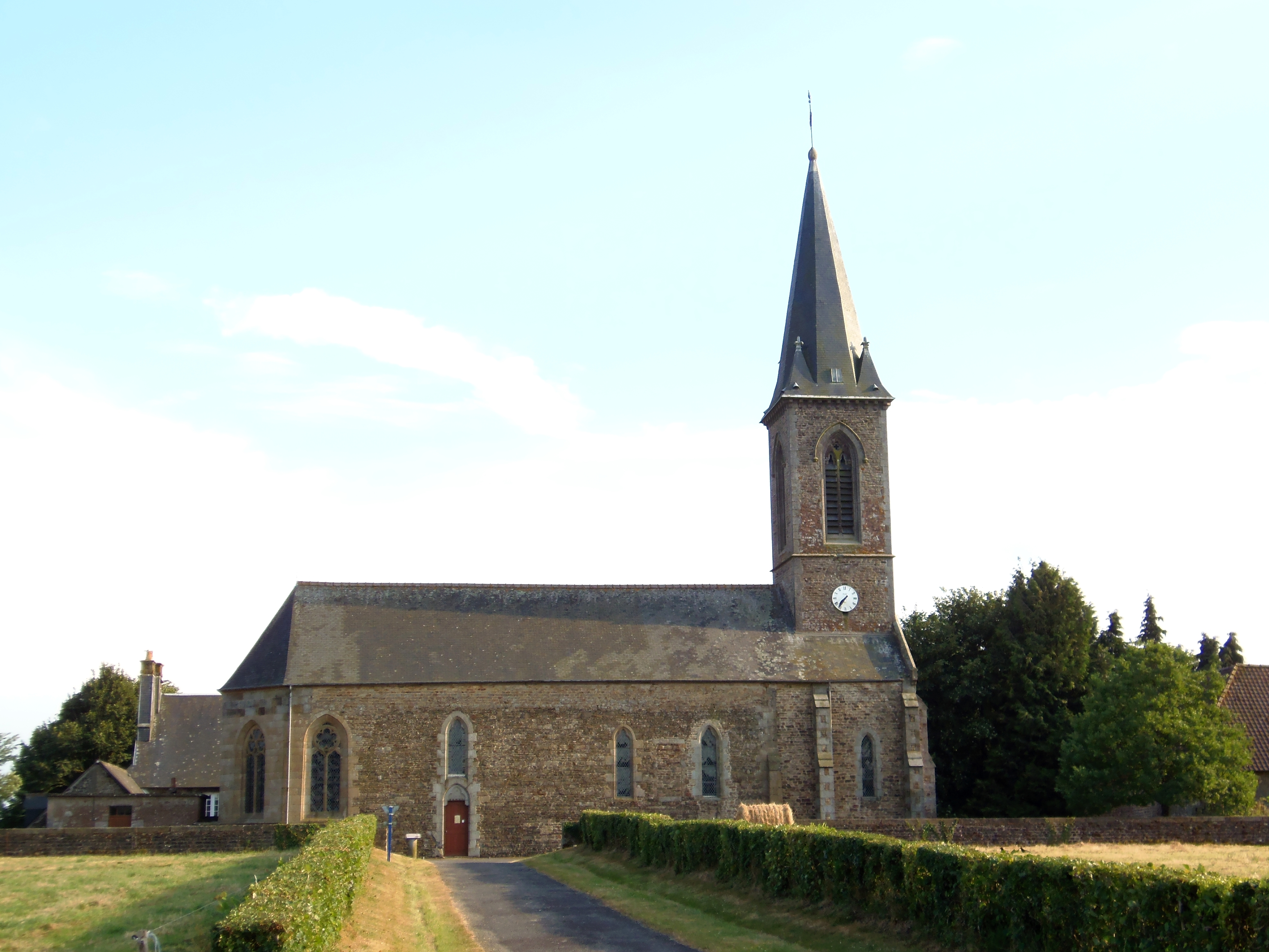 Yvrandes (Normandie, France). L'église Notre-Dame d'Yvrandes (inscrite). .